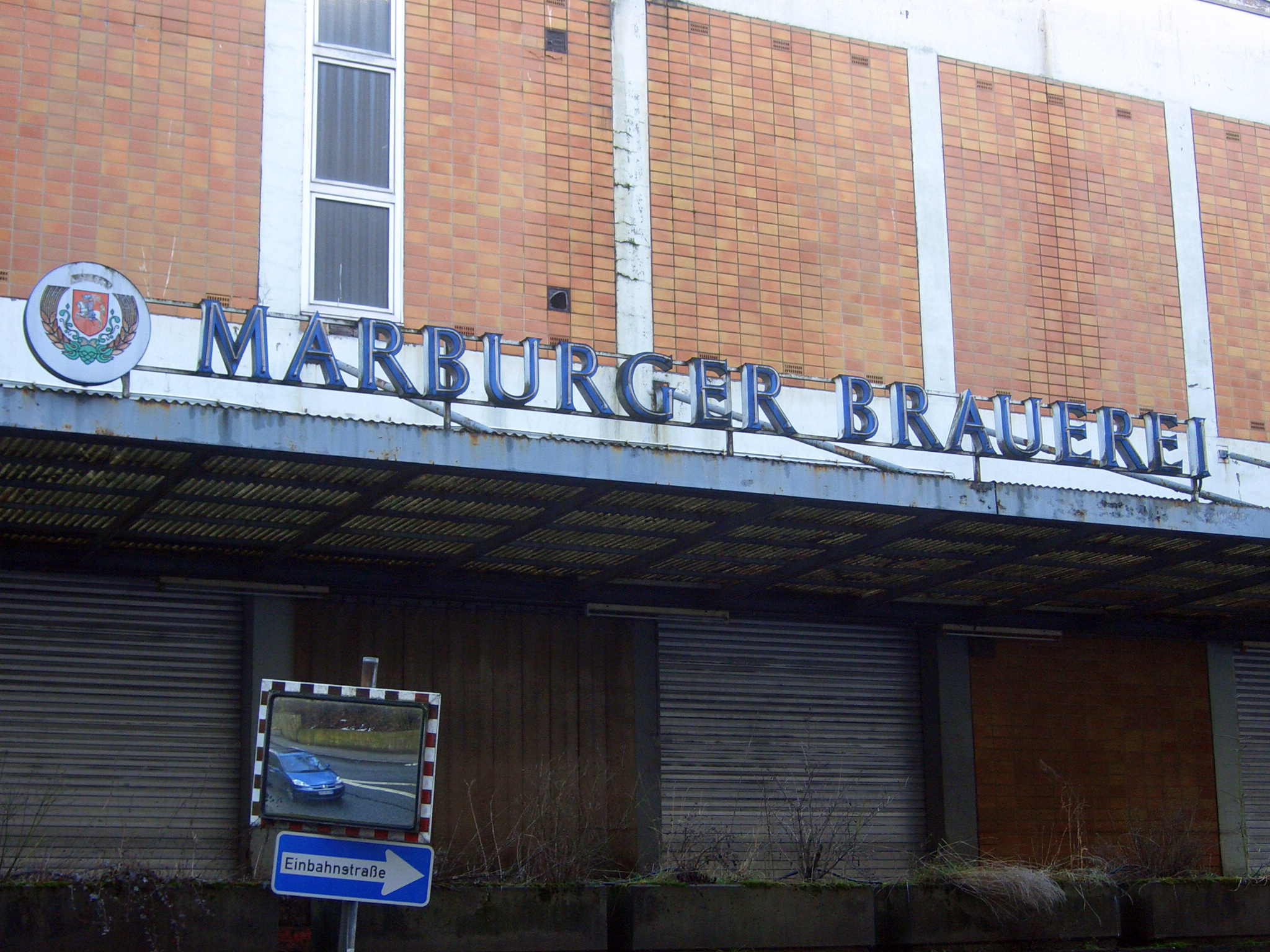 Gebäude der ehemaligen Marburger Brauerei (Marburger Bier), 2006. Mittlerweile abgerissen.